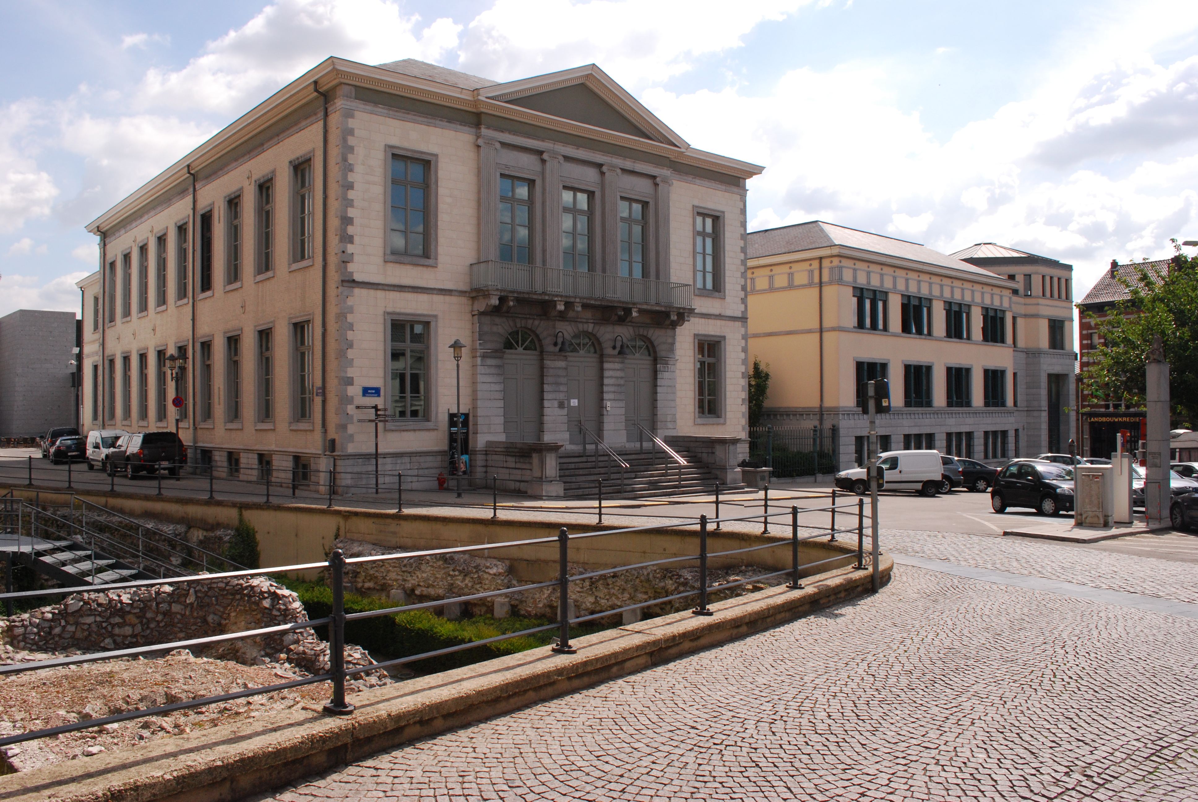 Tongres : Vrijthof, avec à gauche le palais de justice.